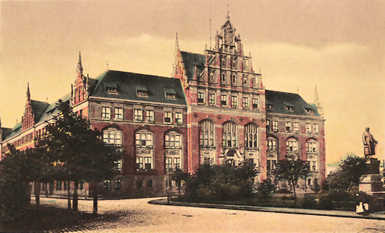 Verwaltungsgebäude der Eisenbahndirektion Essen in Essen, Bismarckplatz